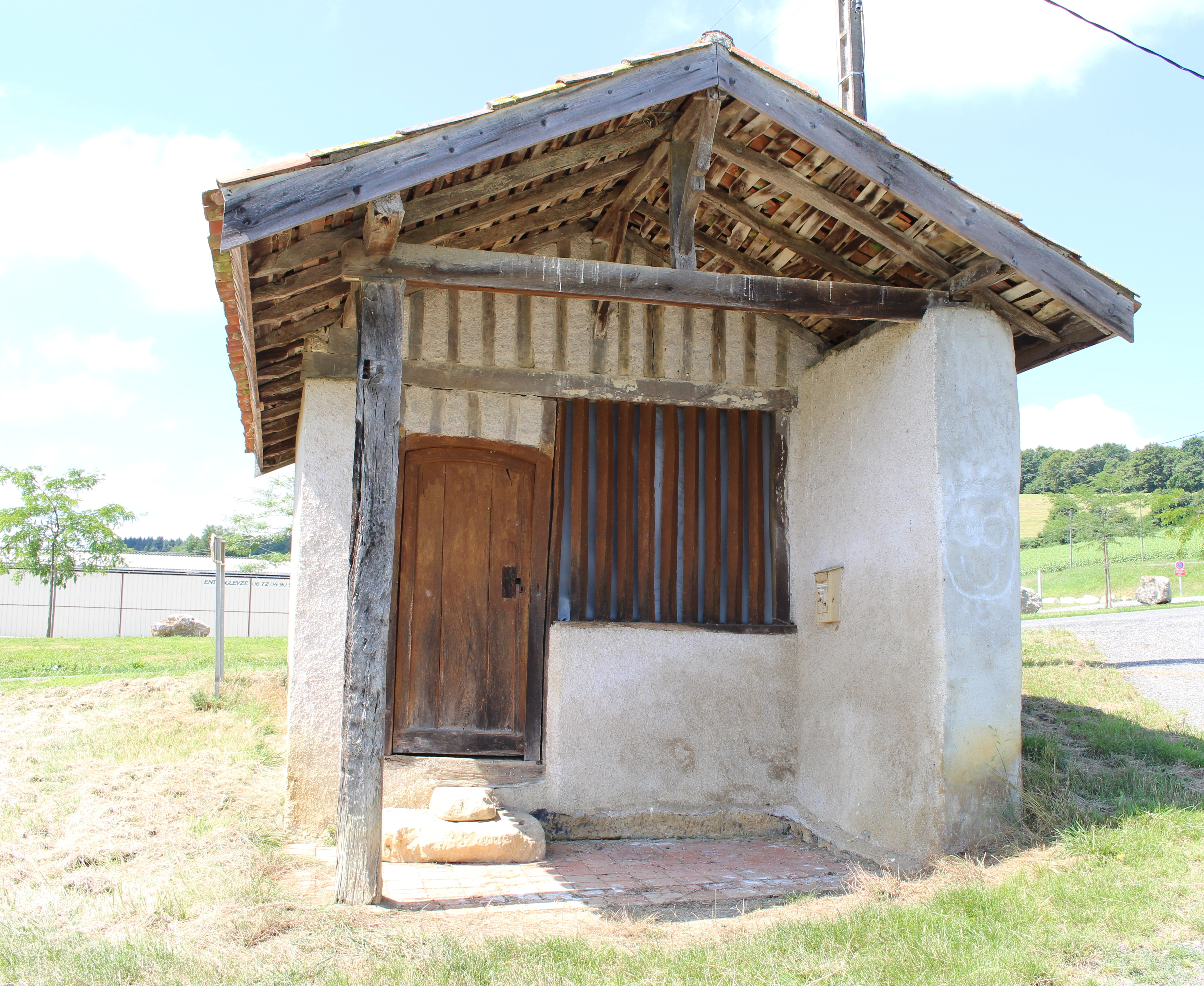 Chapelle Saint-Roch de Libaros (Hautes-Pyrénées)